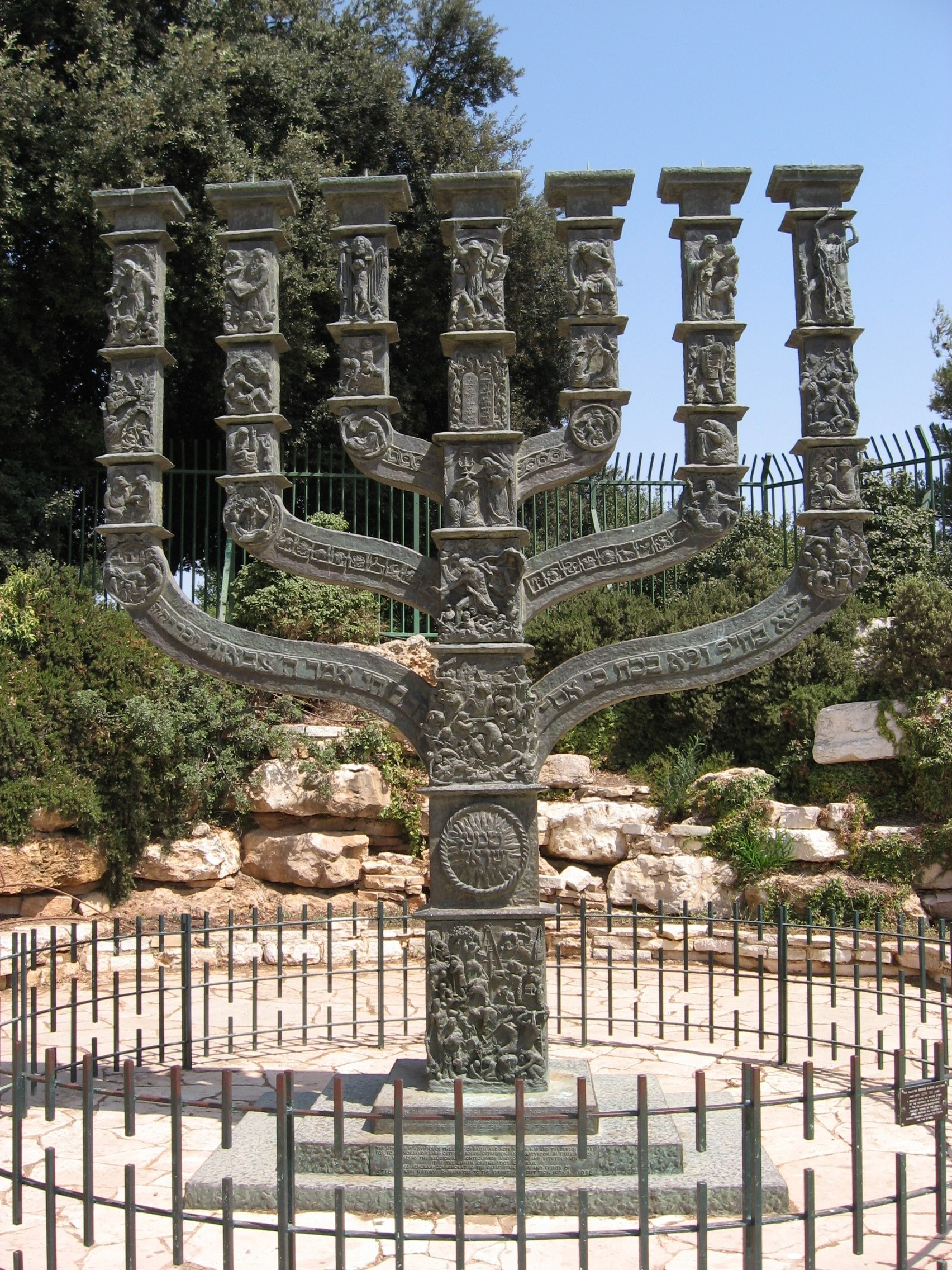 Siebenarmiger Leuchter vor der Knesset in Jerusalem, 29 Einzelreliefs, Bronze, 4,75 m x 3,65 m, 1949-1956, Wk-Nr. 320